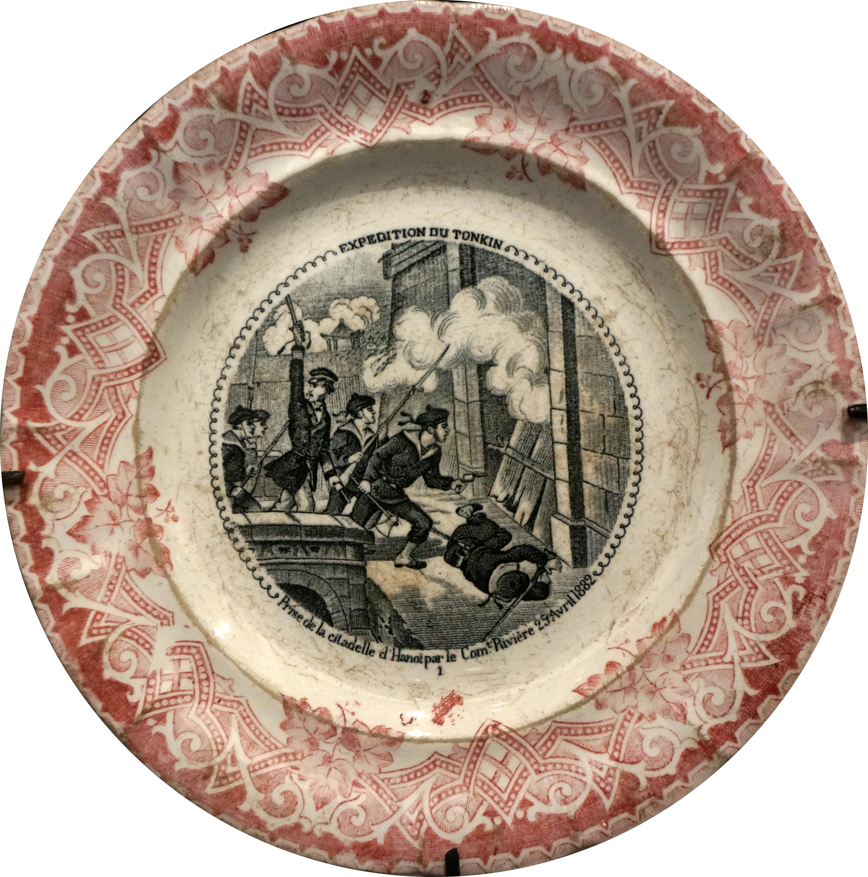 Lors de l'exposition Indochine des territoires et des hommes 1856 1956.